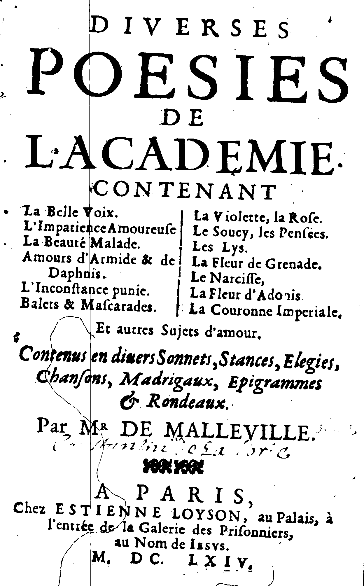 Title page of "Diverses poésies de l'Académie" by French poet Claude Malleville